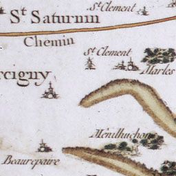 BNF carte de Cassini Téléchargeable librement par internet. Scan d'une carte du domaine public.